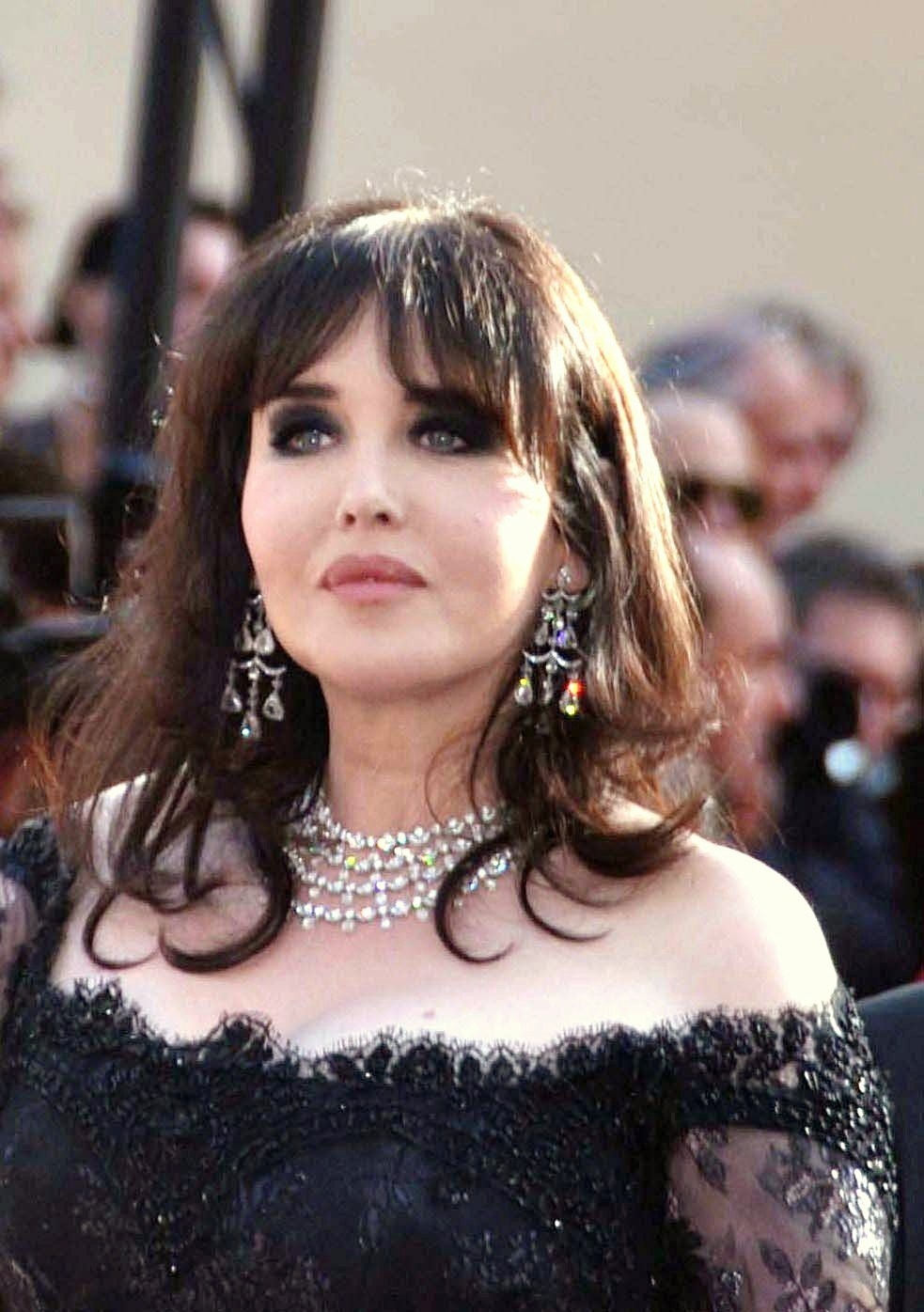 Isabelle Adjani au festival de Cannes